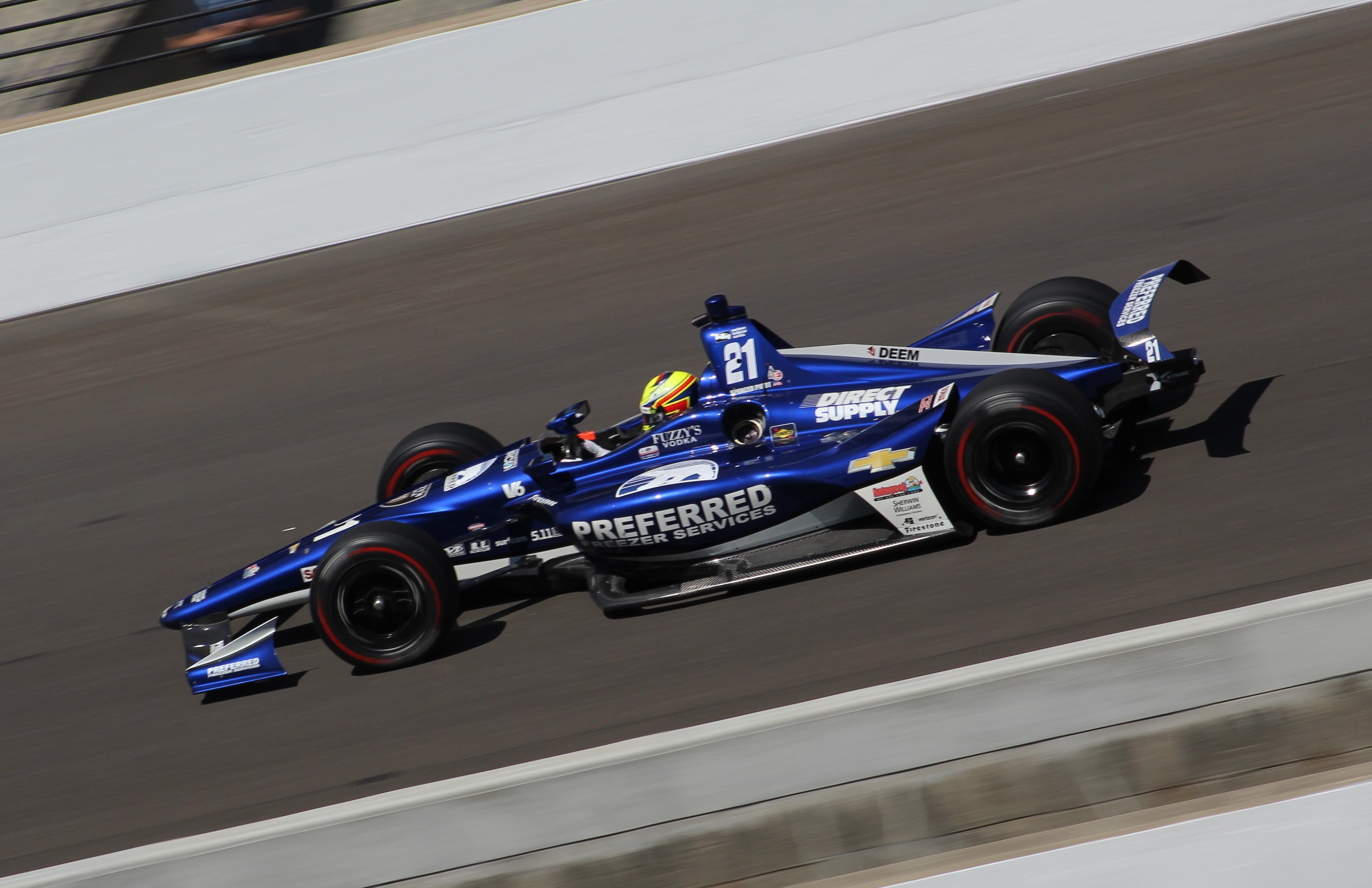 2018 Indianapolis 500